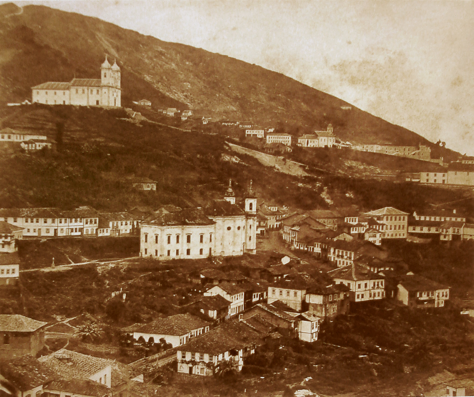 Ouro Preto em c. 1870, fotografia em albúmen